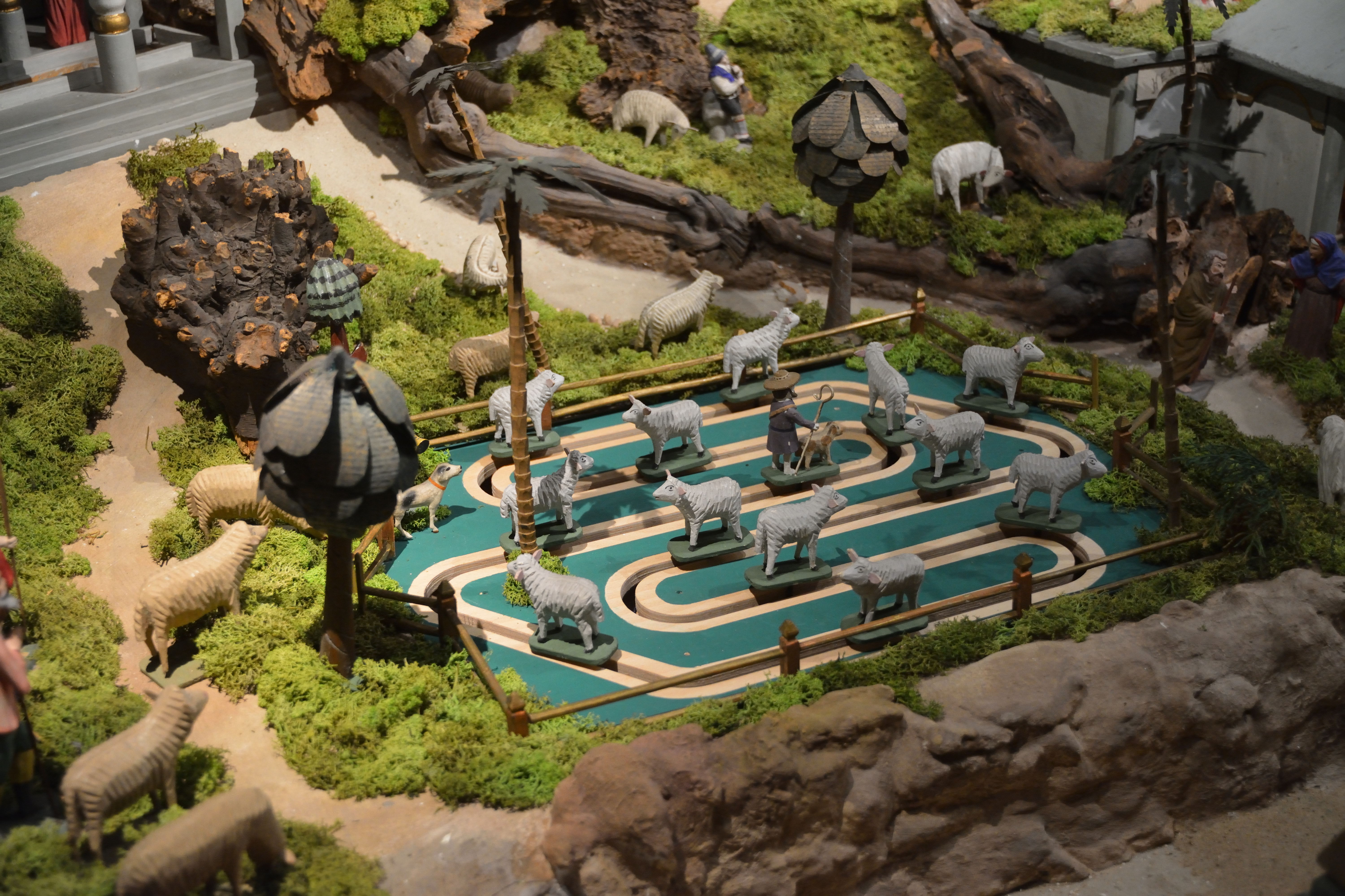 Impressionen aus dem Museum Europäischer Kulturen in Berlin. Ausstellungsraum: Der mechanische Weihnachtsberg aus dem Erzgebirge [1][2]